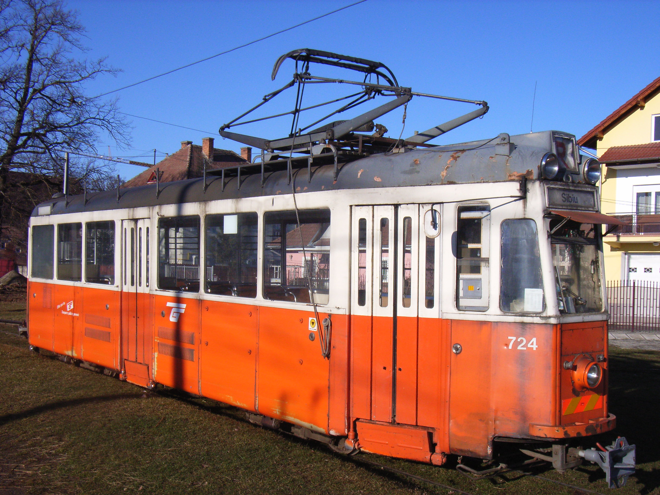 Sibiu-Hermannstadt, Straßenbahn am Gleisdreieck gegenüber dem Friedhof